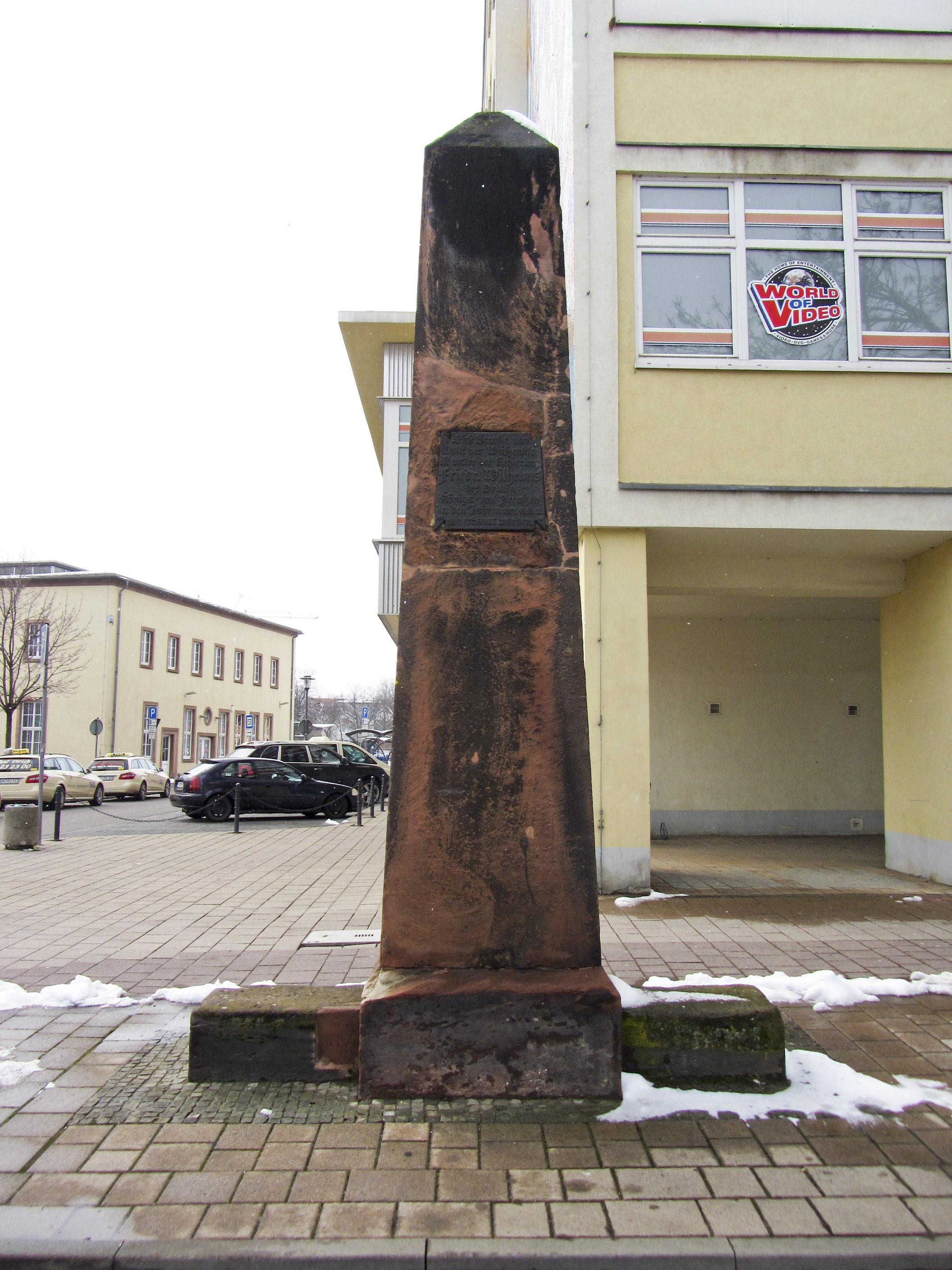 Preußischer Ganzmeilenobelisk in Merseburg